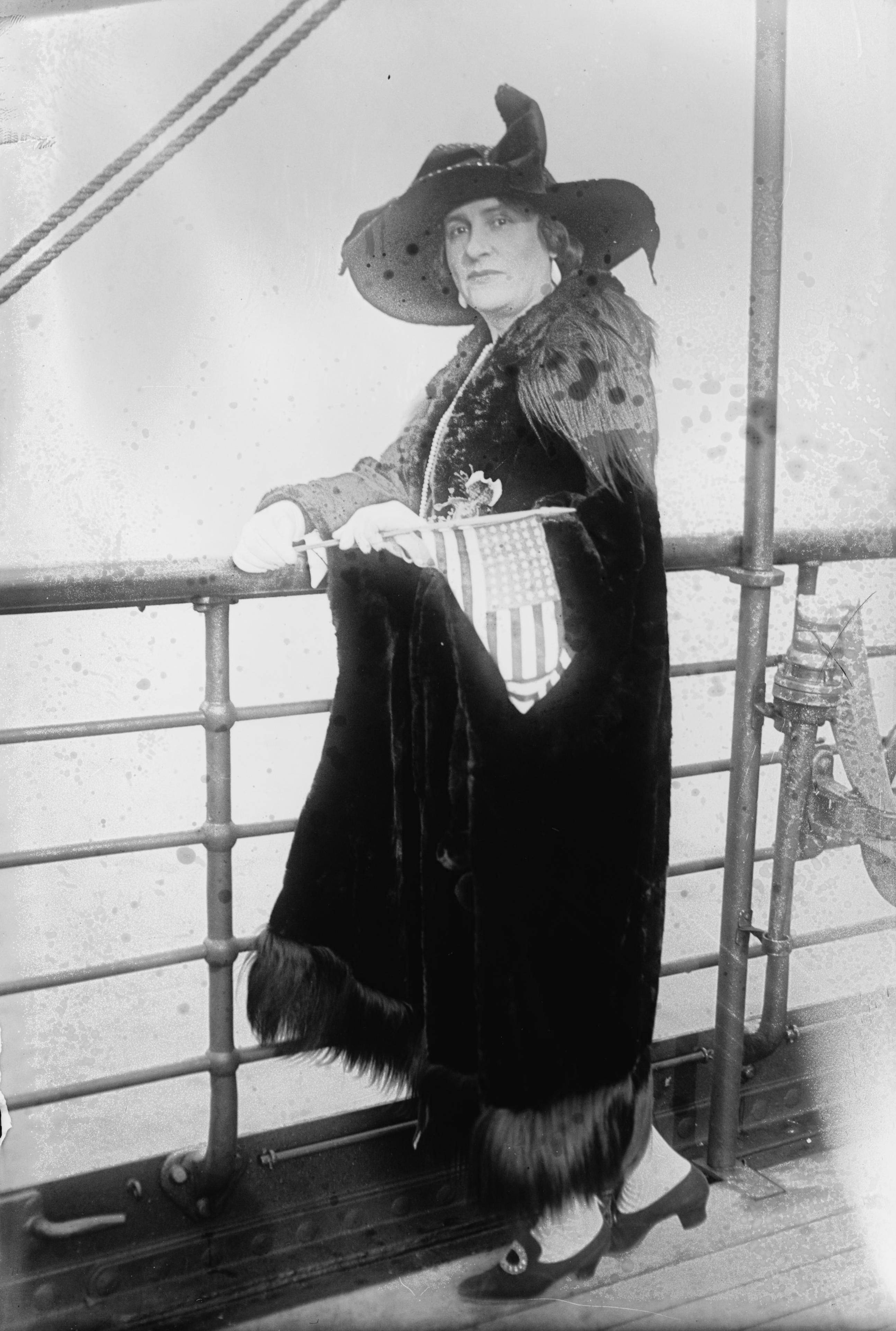 Florence Auer